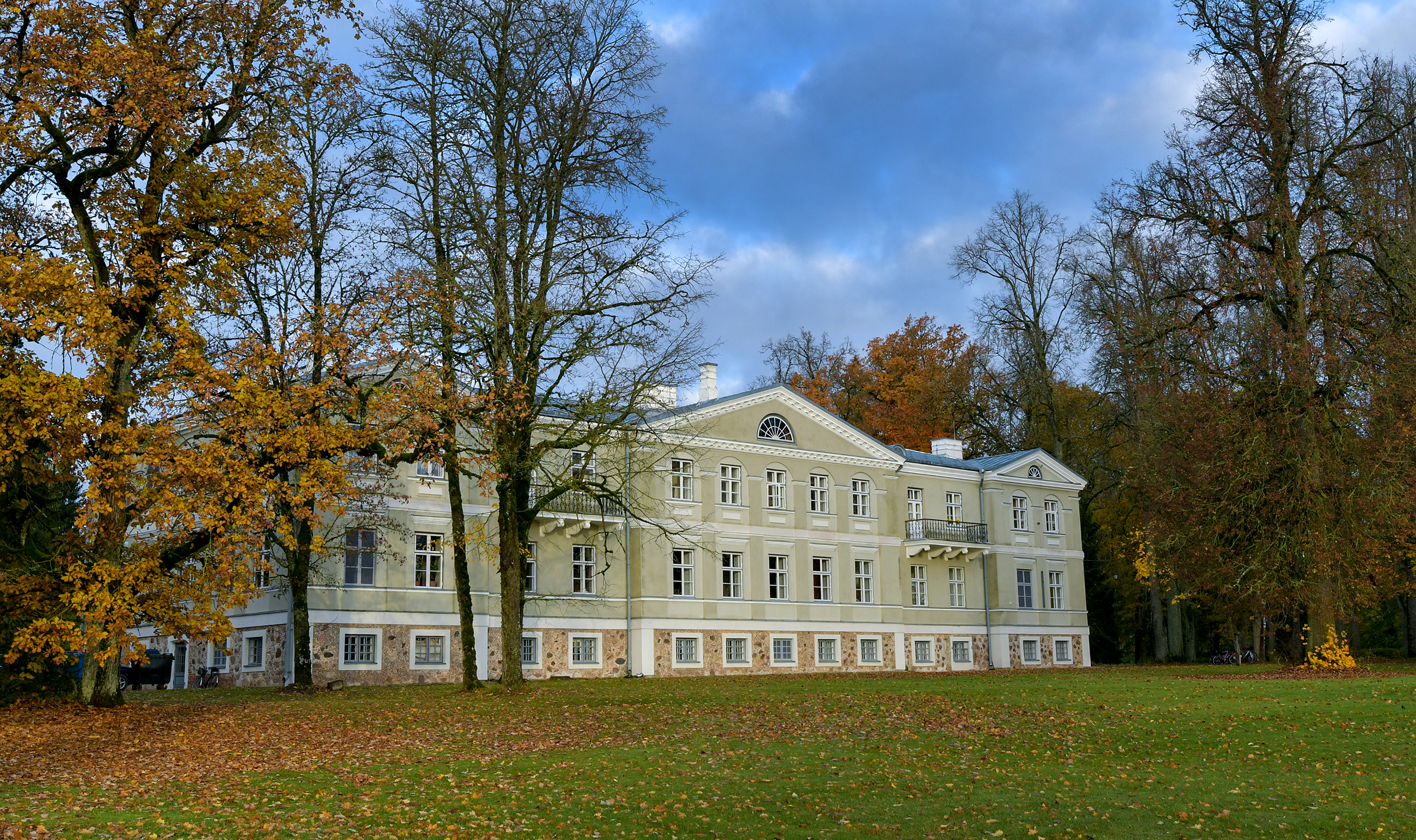 Suure-Kõpu mõis häärber